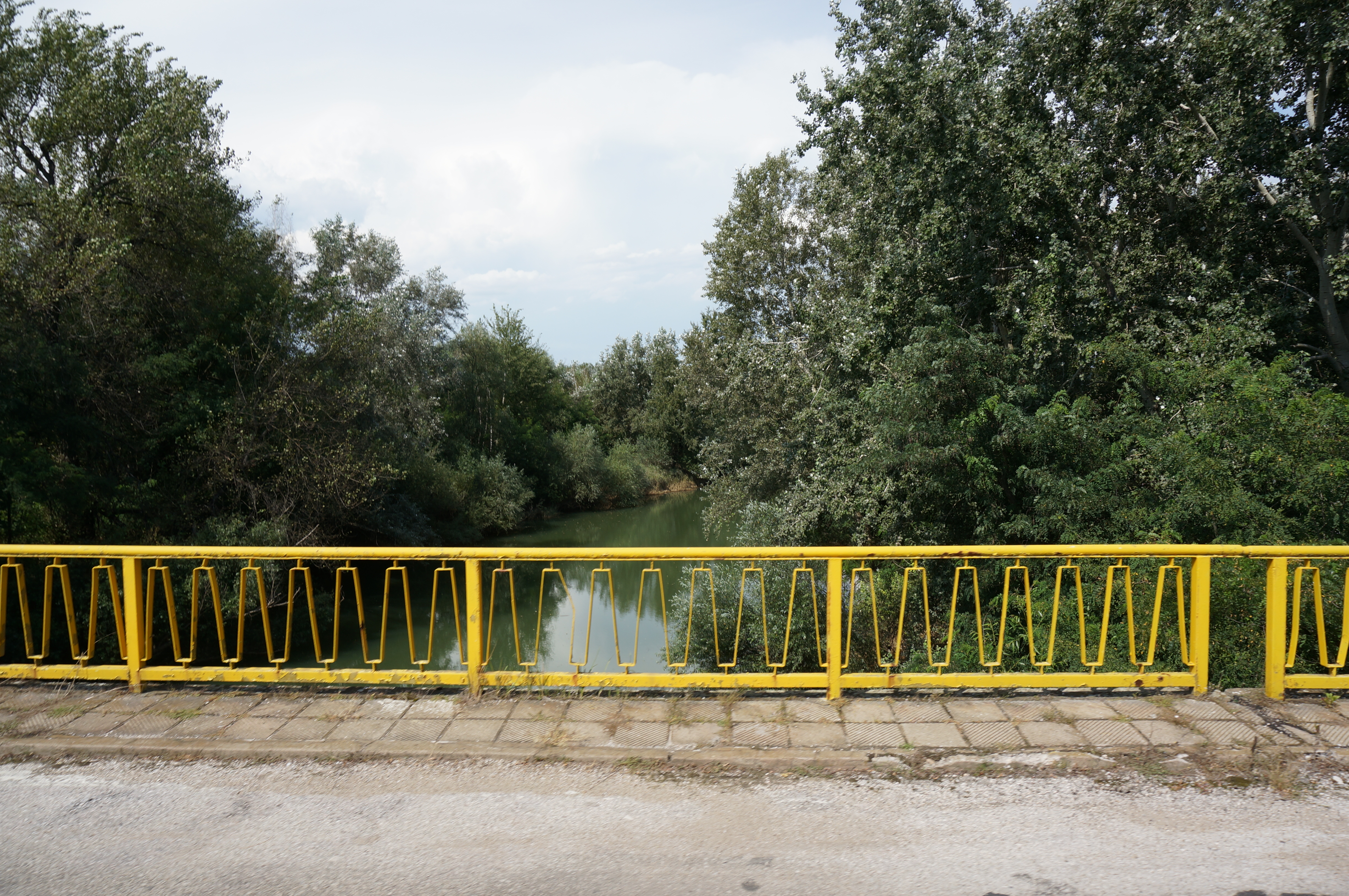 une vue de .